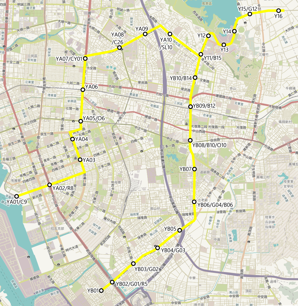 高雄捷運 捷運黃線 2017年剛升格中運量時的規劃